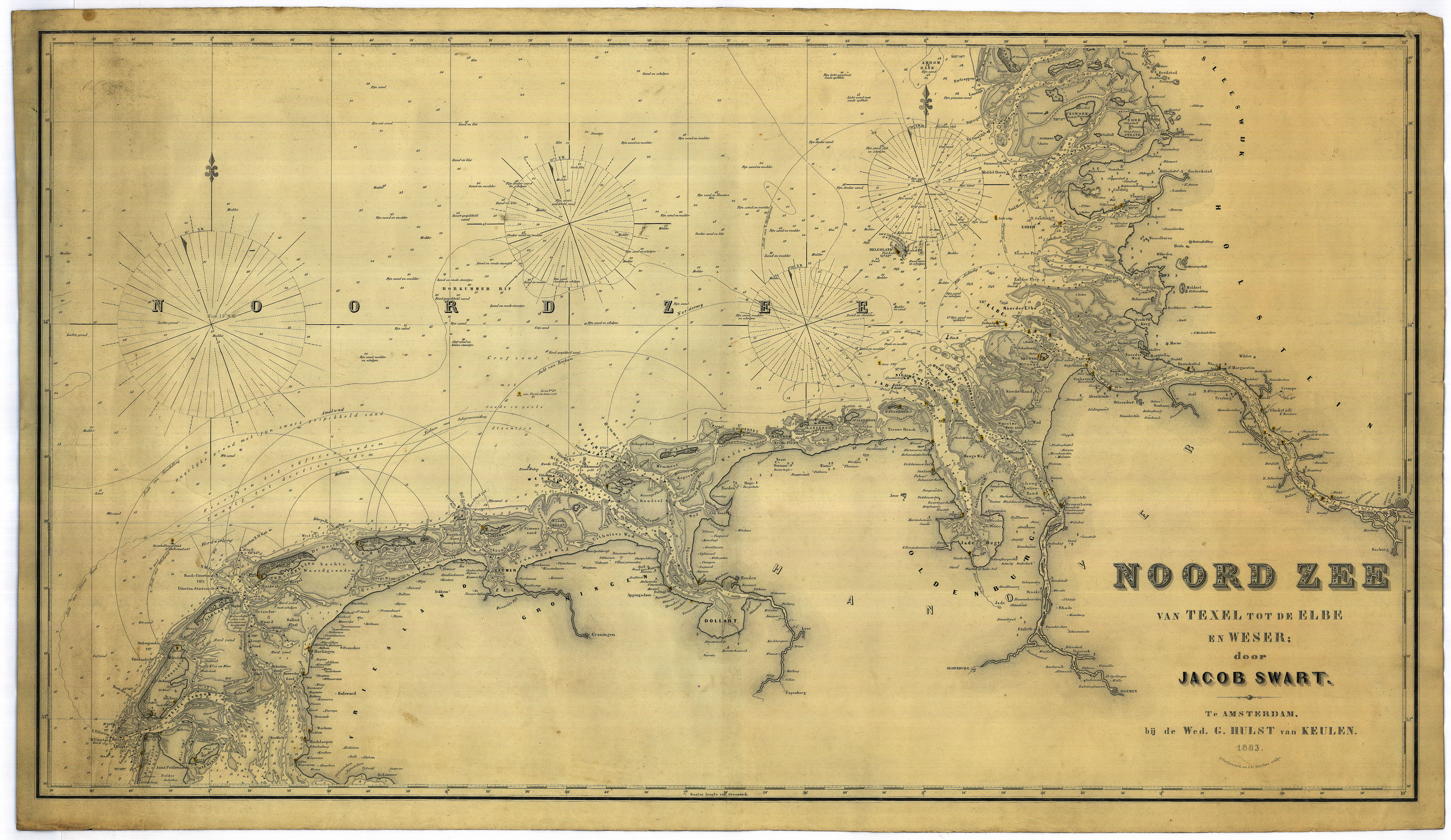 Zeekaart van de Noordzee uit 1883